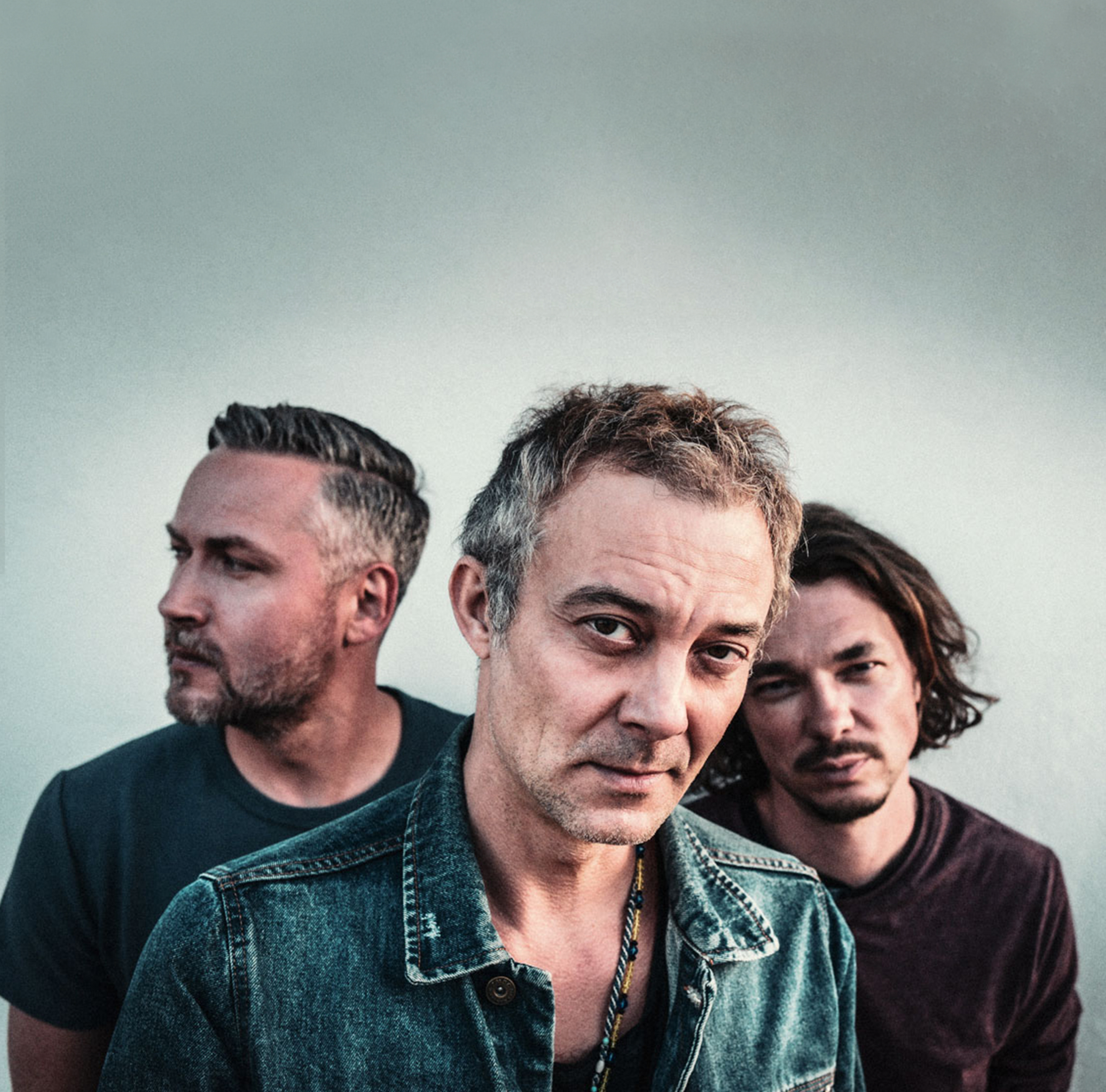 Le Payaco 2020